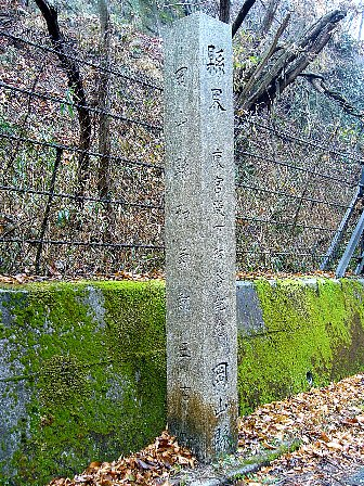 船坂峠 旧道にある「縣界」石碑 岡山県側から兵庫県側を望む 大正15年（ja:1926年）5月、皇太子（後のja:昭和天皇）の行啓を記念し、岡山県によって建立されたもの 兵庫県側に「兵庫縣赤穂郡松坂村」岡山県側に「岡山縣和気郡三石町」と、当時の町村名が刻まれている